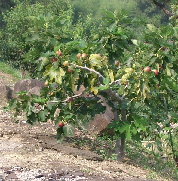 Ficus carica